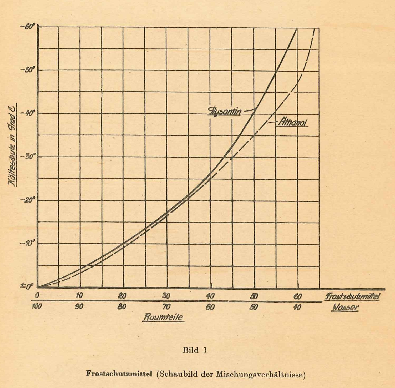 Mischungsverhältnis Frostschutzmittel